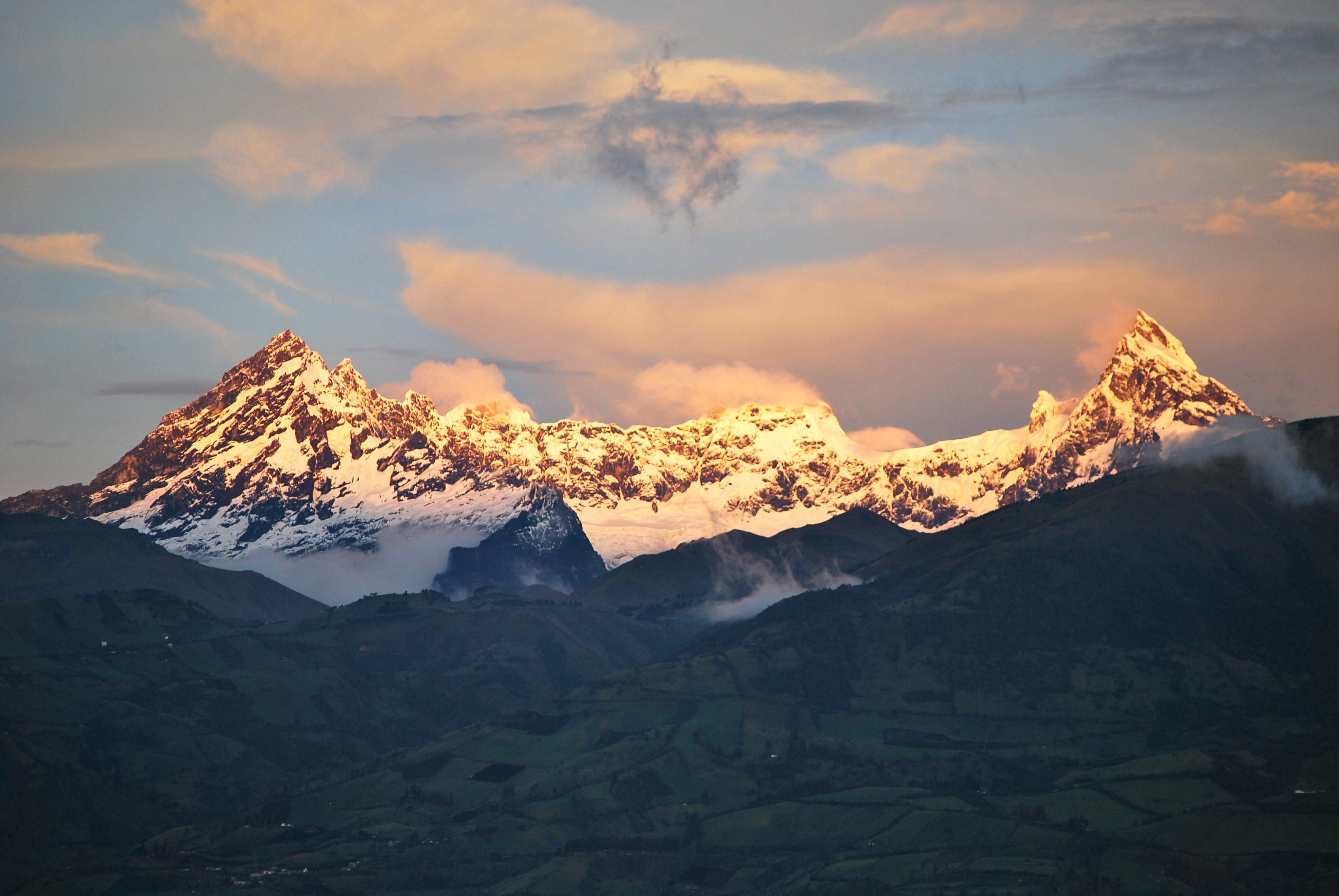 Volcán El Altar - Riobamba Ecuador